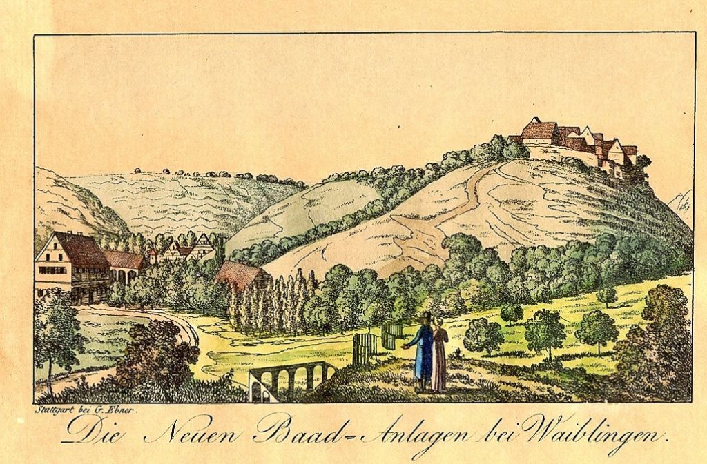 Eine Lithografie aus der Zeit um 1820 zeigt die neuen „Baad-Anlagen“ und den Park.